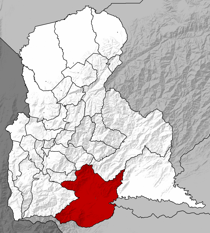 Municipio Fernandez Feo - Táchira